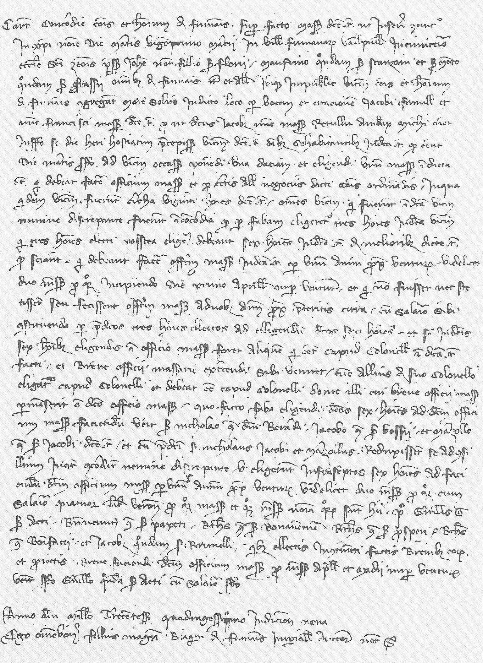 Testo di un verbale di un Consiglio comunale tenutosi a Fumane (provincia di Verona) nel 1341. Da questo di può stimare che la popolazione fosse compresa tra i trecentocinquanta e i quattrocento abitanti.